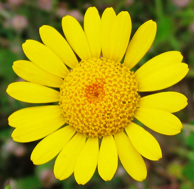 Beschreibung: Färber-Hundskamille (Anthemis tinctoria) Fotograf: Darkone, 25. Juli 2004